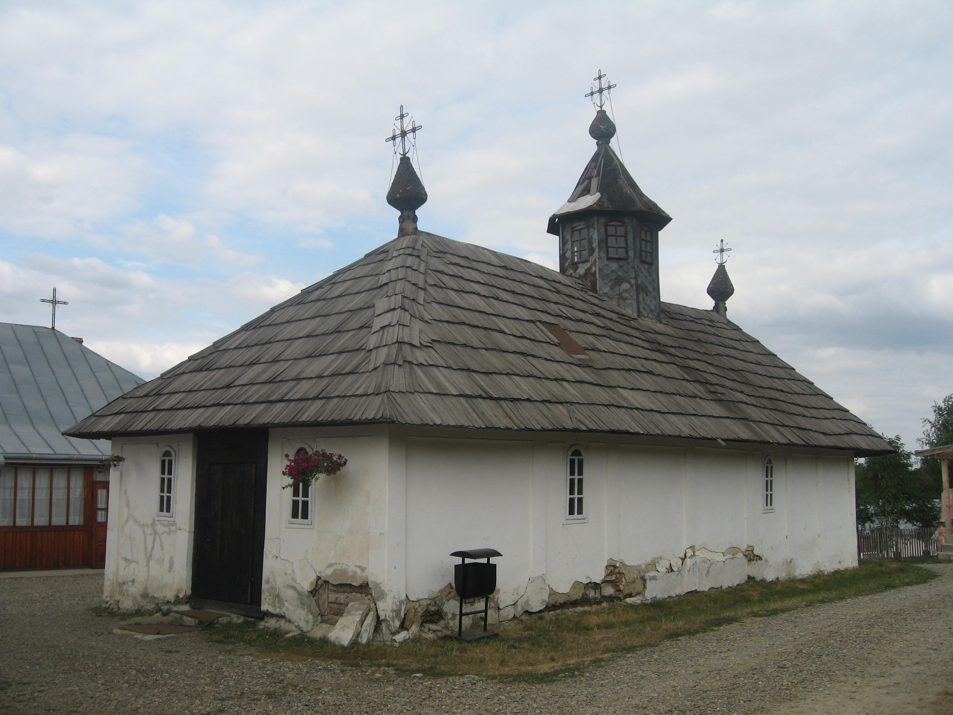 Biserica de lemn din Mănăstirea Zosin 01